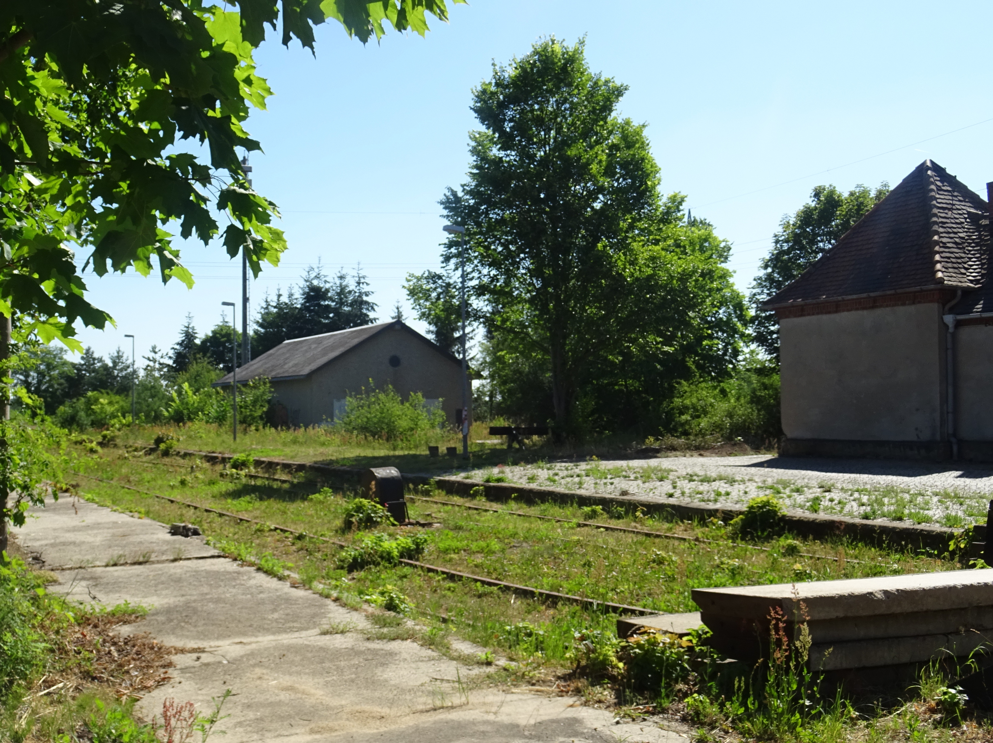 Bahnhof Güsen, ehemaliger Kleinbahnhof, Bahnsteige